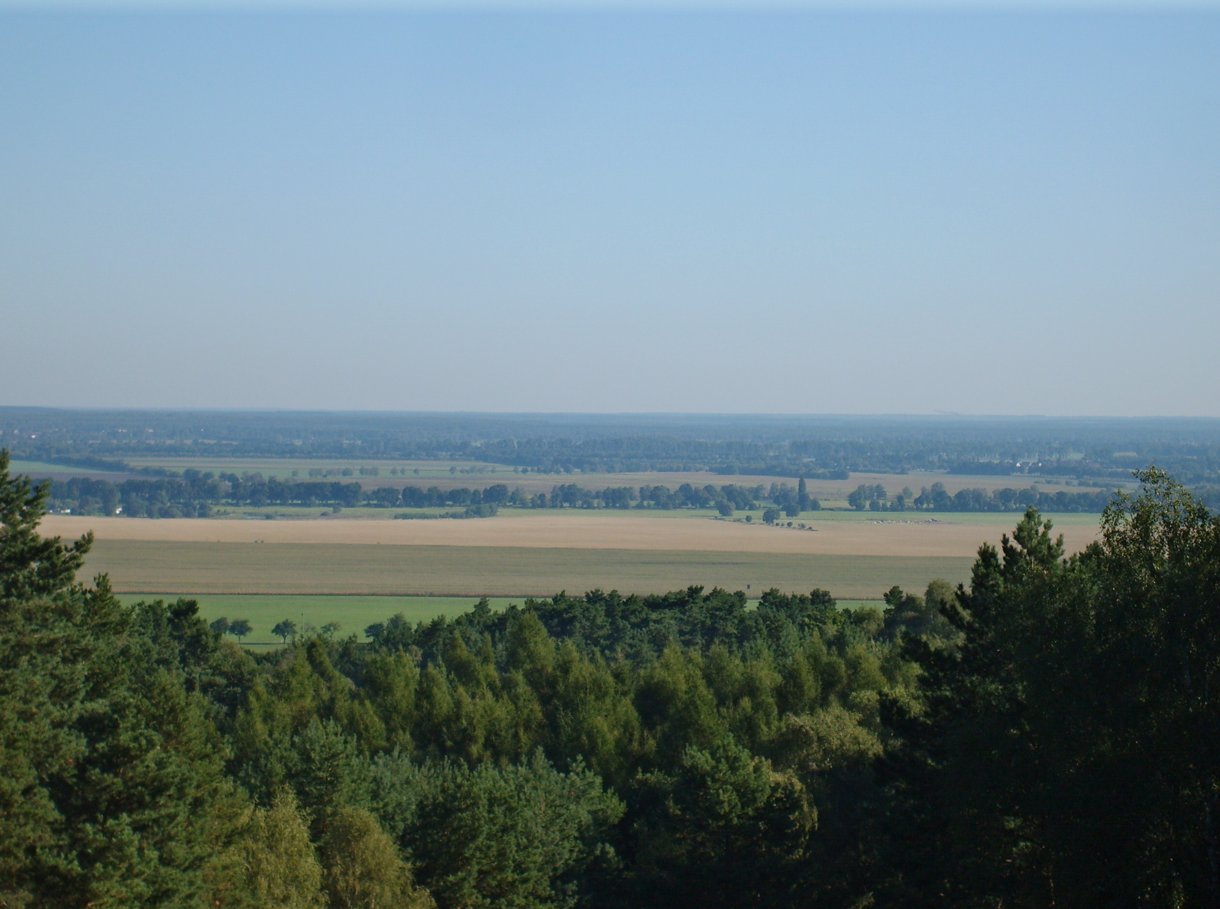 Der Schraden von der Heidehöhe aus gesehen.